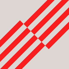 中文（香港）: 2019年版共和委員會標誌，由灰色背景與令旗的四個紅色橫間組成。